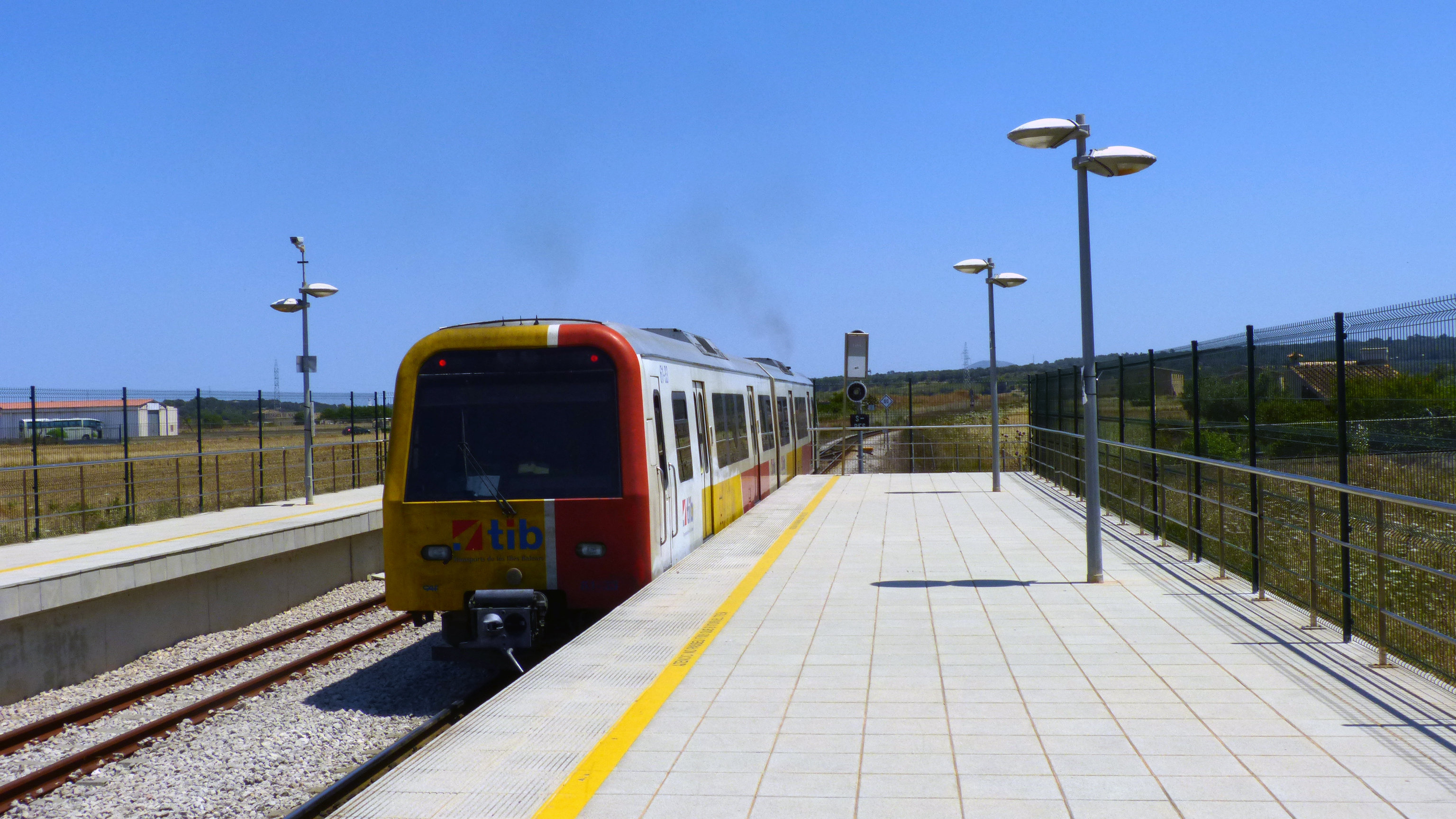 Bahnhof der Stadt Petra (Mallorca) mit dem Dieseltriebwagen 61-34 und 61-34 der SFM auf der Fahrt nach Manacor